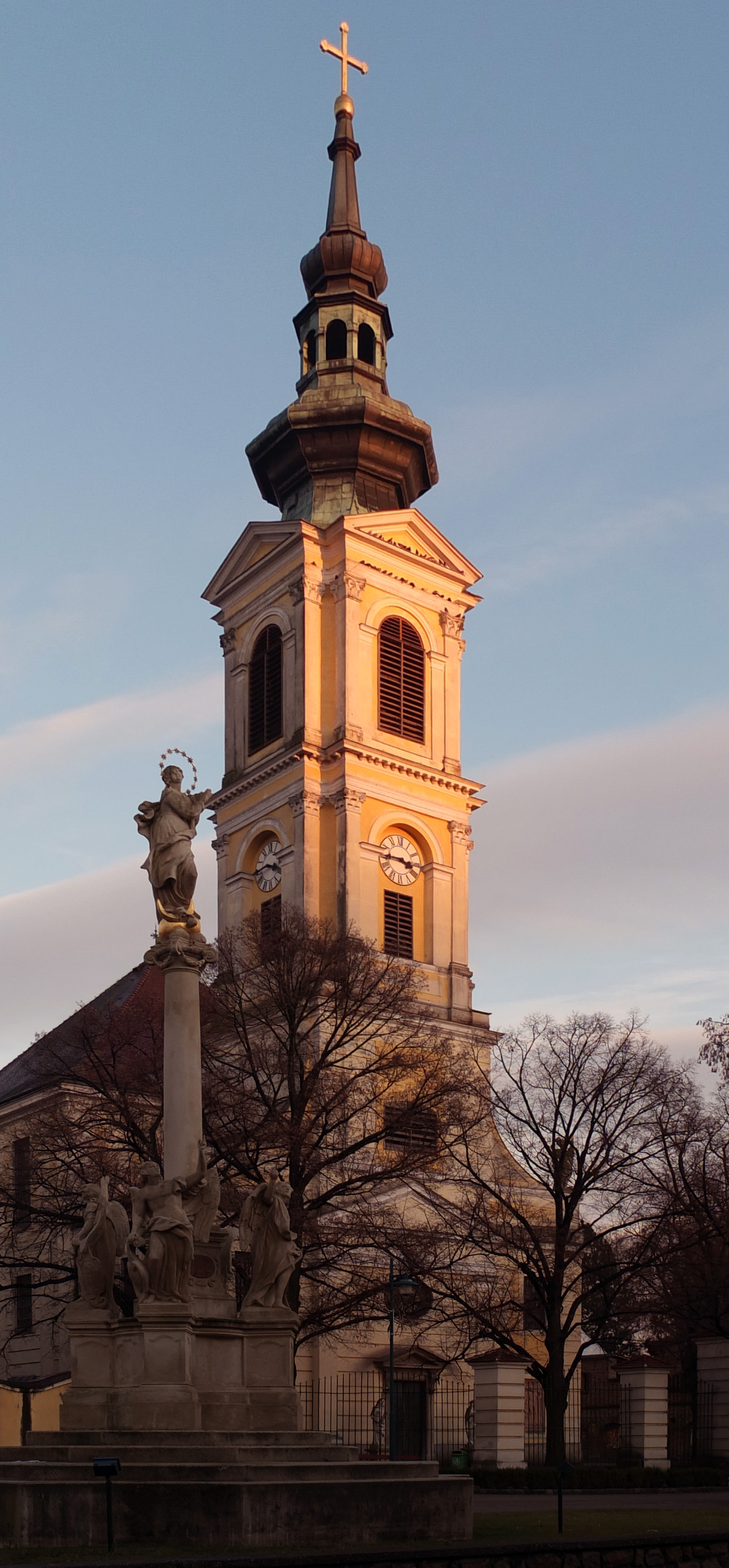 Kath. Pfarrkirche hl. Georg (Fischer von Erlach-Kirche) in Großweikersdorf, im Vordergrund die Mariensäule (Maria Immaculata) aus 1720.